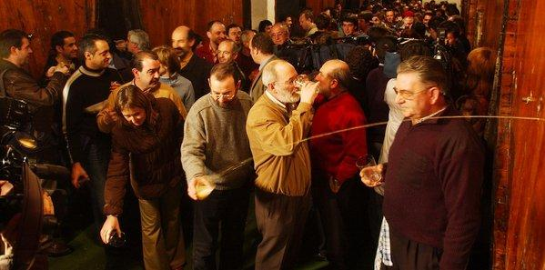 Argazkia txikitua eta ebakita errazago erabiltzeko.